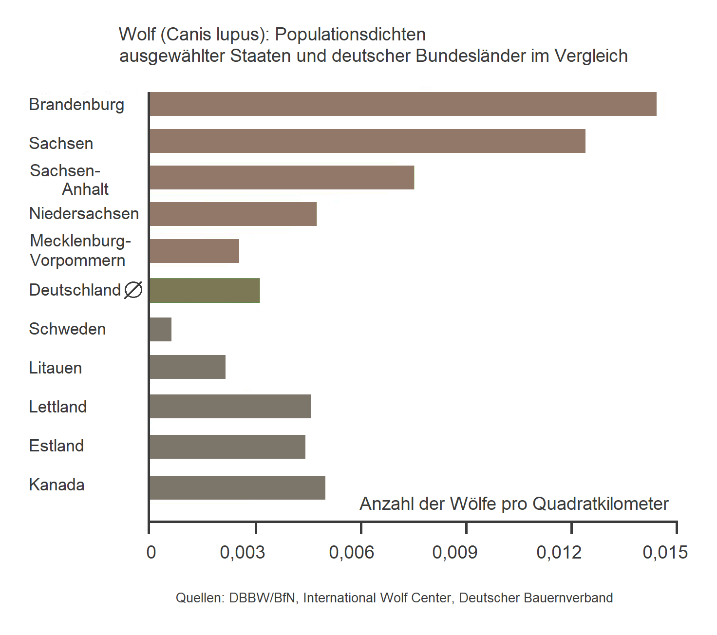 Vergleich der Populationsdichten bei den Wolfsbeständen in Deutschland und anderen Staaten. Quelle: [1]